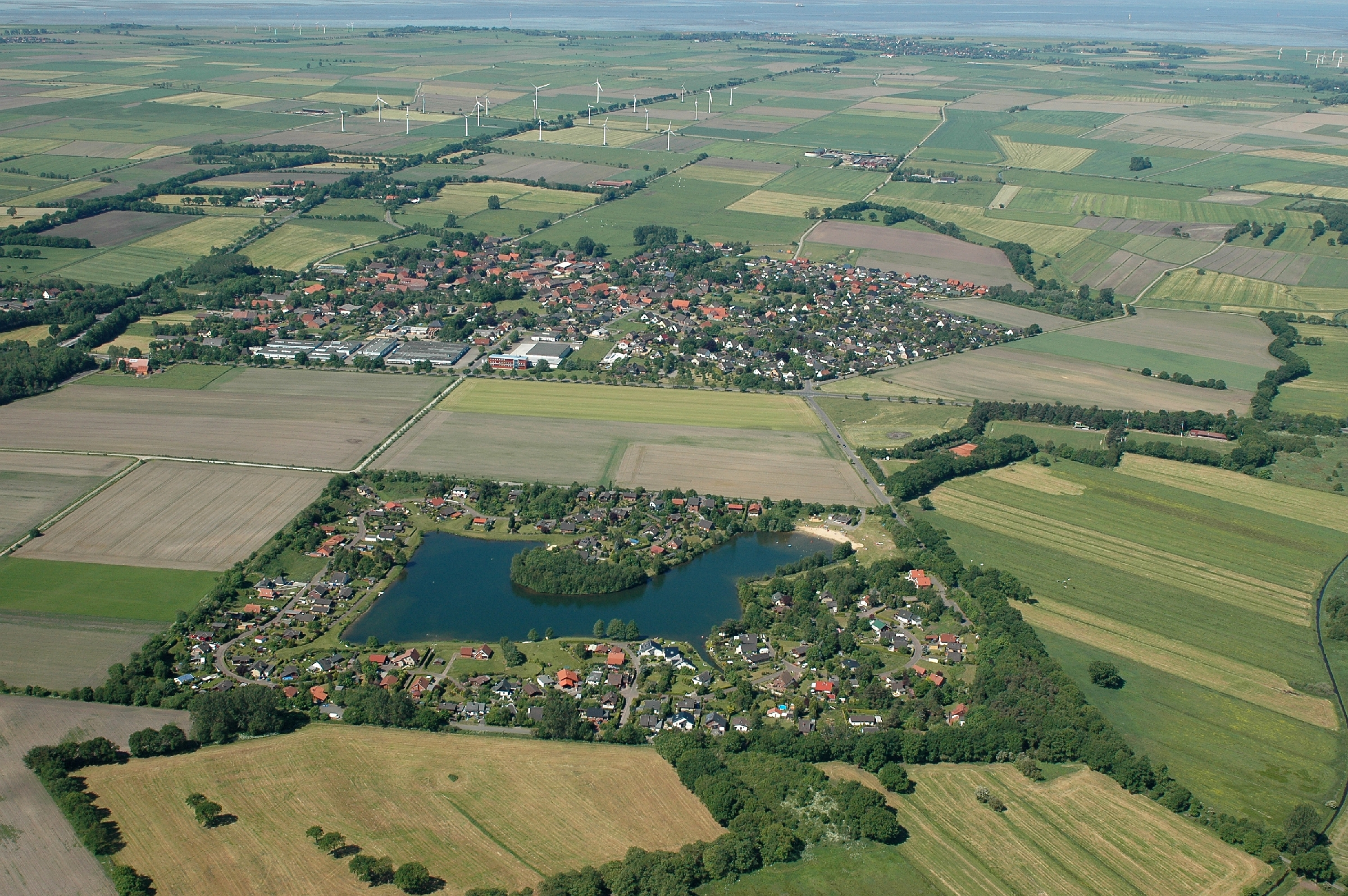 Fotoflug vom Flugplatz Nordholz-Spieka über Cuxhaven und Wilhelmshaven